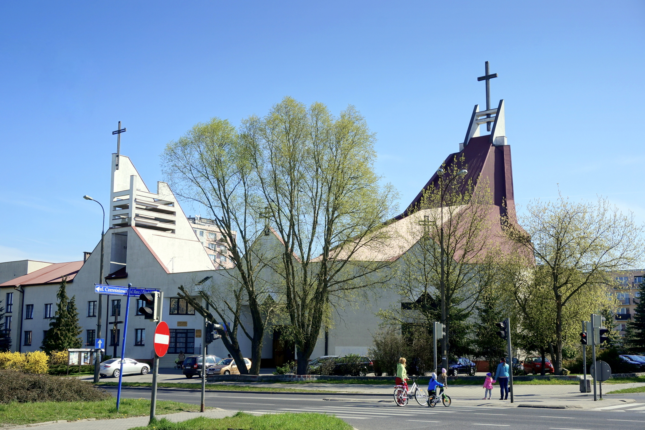 Gorzów Wlkp. Kościół parafii św. Maksymiliana Marii Kolbego u zbiegu ul. Czereśniowej i ul. Piłsudskiego. Projekt architektów Pawła i Jacka Sierakowskich.